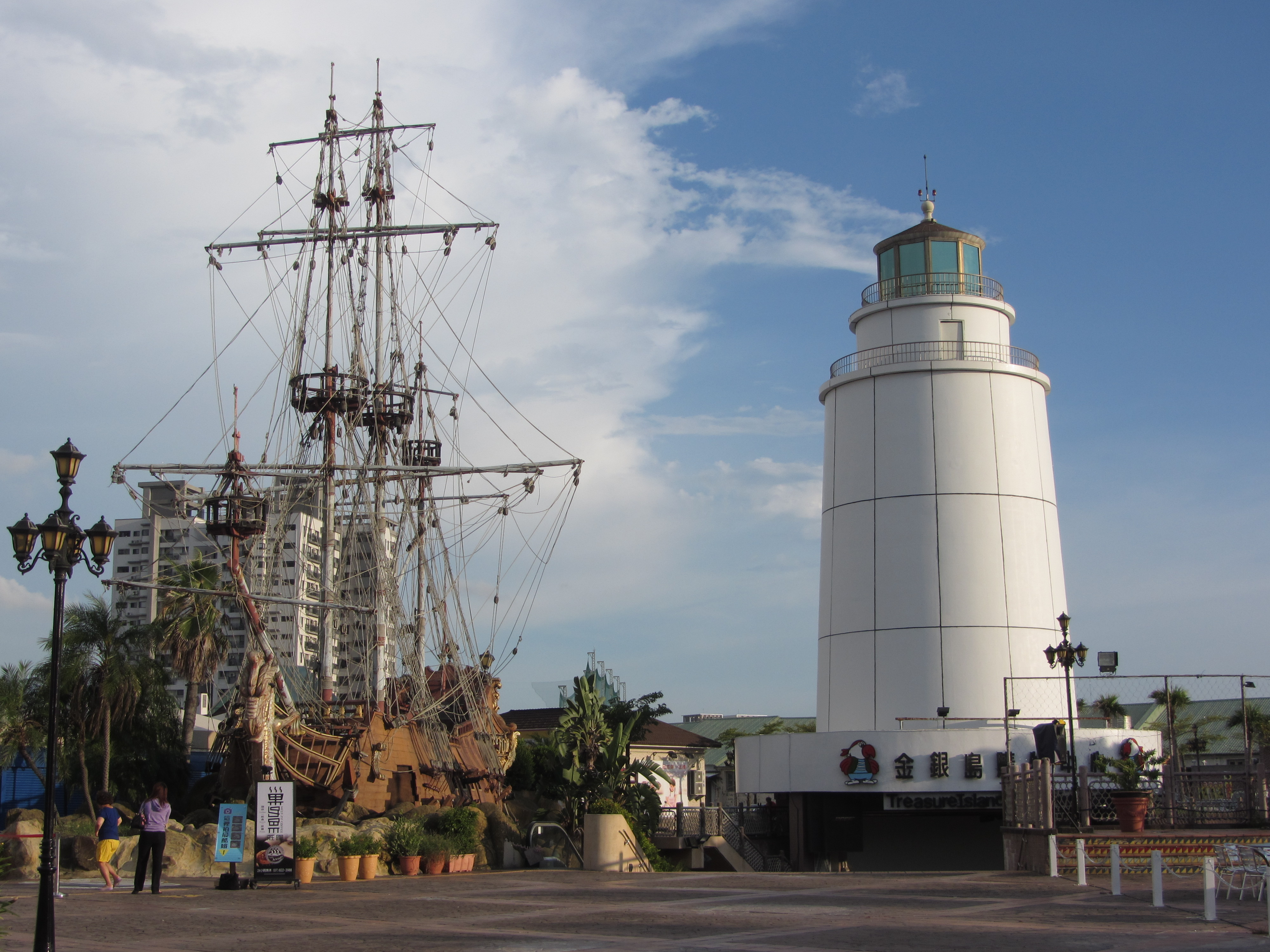 金銀島購物中心內的海盜船與燈塔